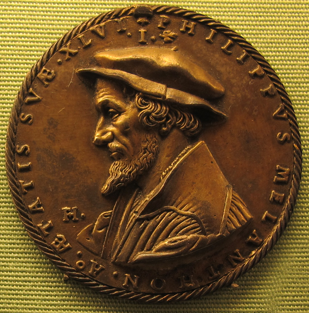 Filippo Melantone, 1543